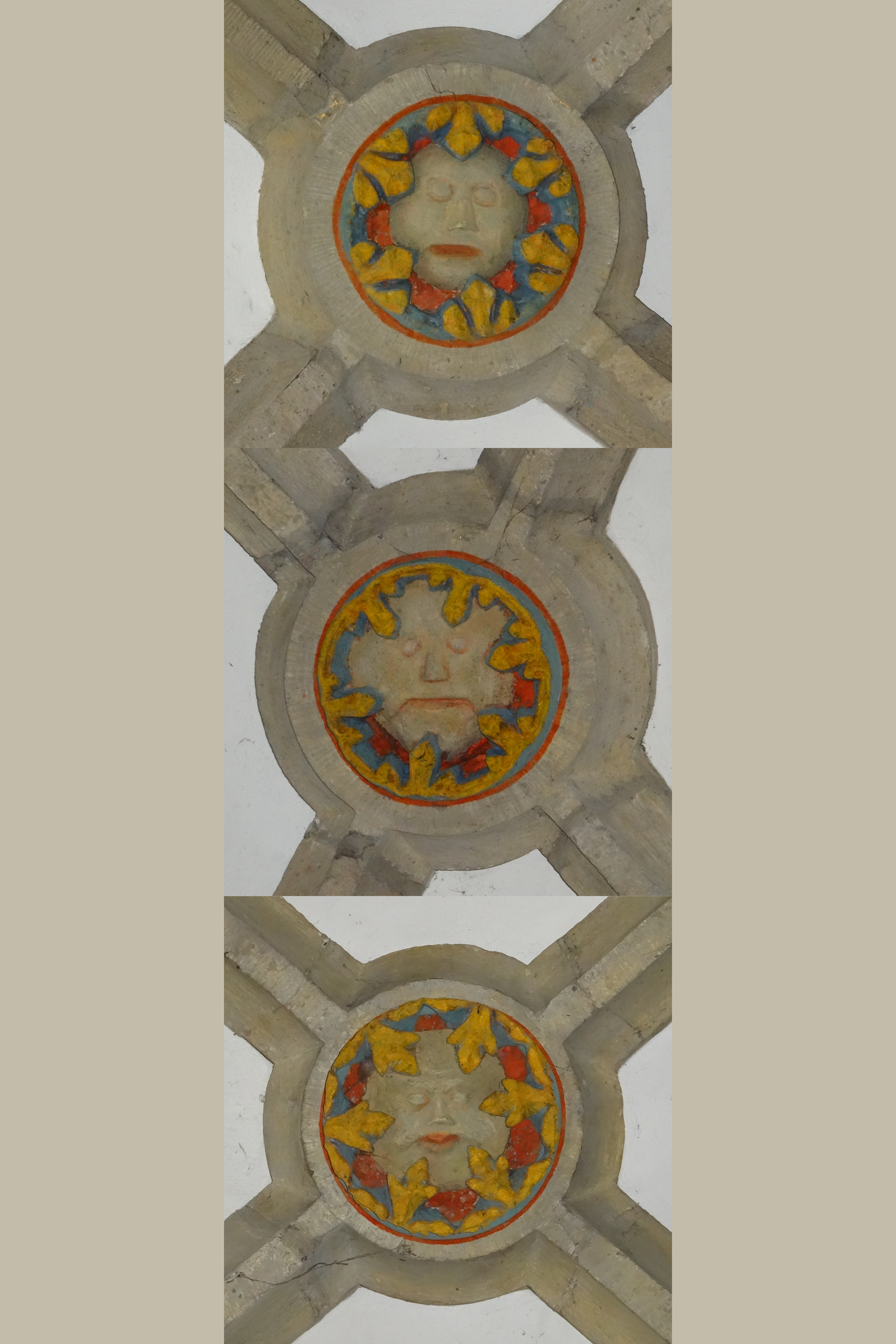 Schlusssteine mit Gesicht im südlichen Seitenschiff